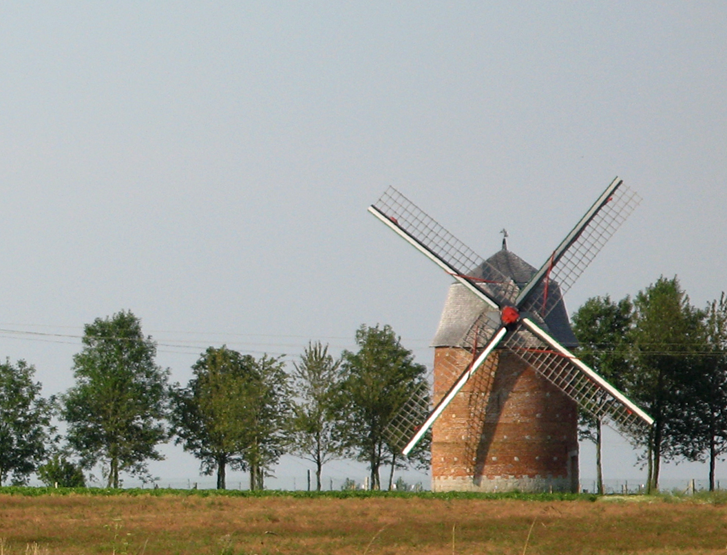 Candas (Somme, France) - Le "moulin Fanchon".